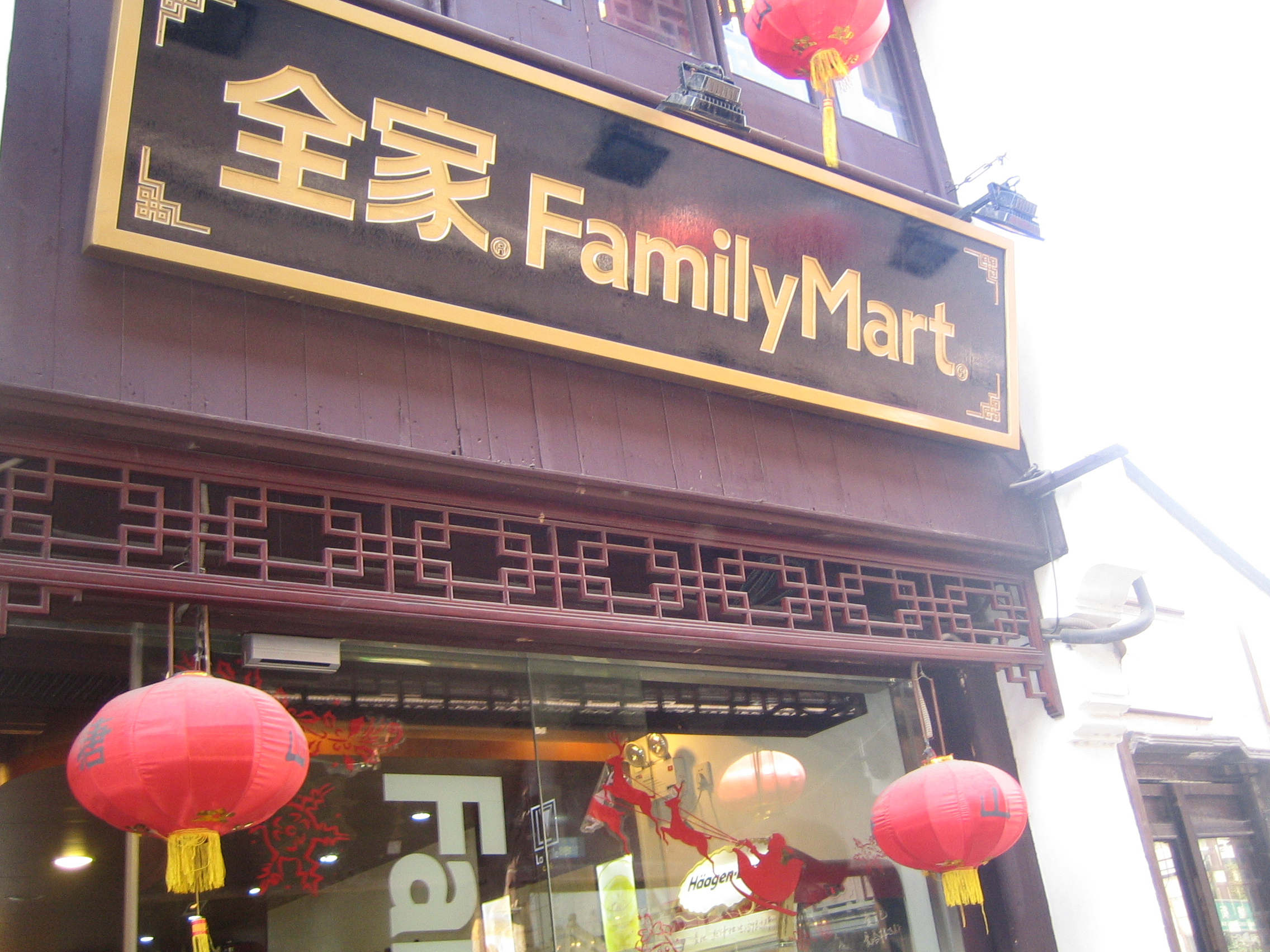 位于苏州山塘街的全家便利商店